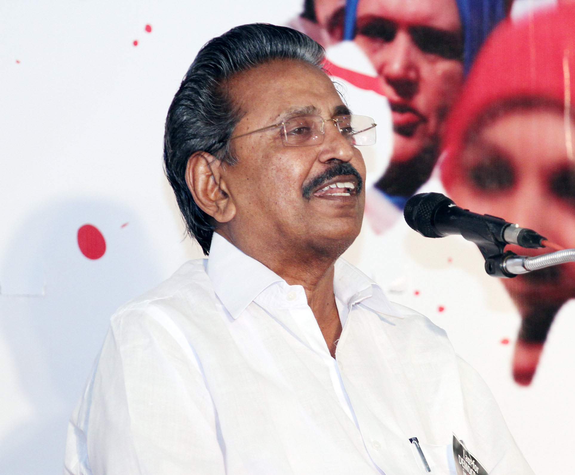 എം.ഐ.ഷാനവാസ് എം,പി